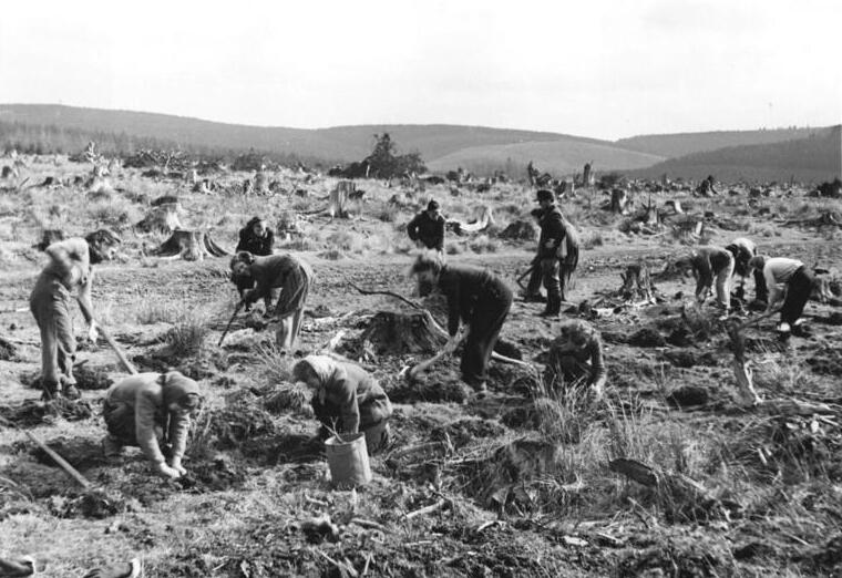 Benneckenstein, Aufforstung, Jugendbrigade Aufforstung sämtlicher Kahlflächen in der DDR im Fünfjahresplan. Durch eine planvolle Aufforstungstätigkeit mit Beginn des 2. Jahresplanes durch Erweiterungen der Forstgärten und Forstbaumschulen wurden die Voraussetzungen geschaffen, im Gebiet unserer Republk Aufforstungen solchen Umfanges vorzunehmen, wie sie bisher in der deutschen Forstwirtschaft nicht vorgekommen sind. Ein Aufforstungschwerpunkt ist der Oberharz. UBz: Bereits im Herbst werden die Löcher gehackt, in die im folgenden Frühjahr die Pflanzen eingepflanzt werden sollen. Wie überall, steht die Jungendbrigade der Oberförsterei Benneckenstein auch bei der Erfüllung des Aufforstungspanes in erster Reihe.